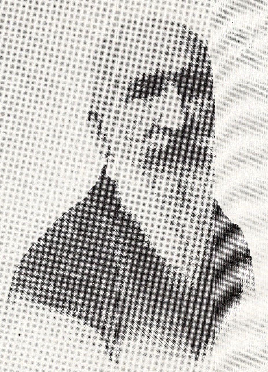 Portret Edmunda Chojeckiego, wg. drzeworytu Józefa Holewińskiego w "Kłosach". Przedruk za książką Ciołkoszów.